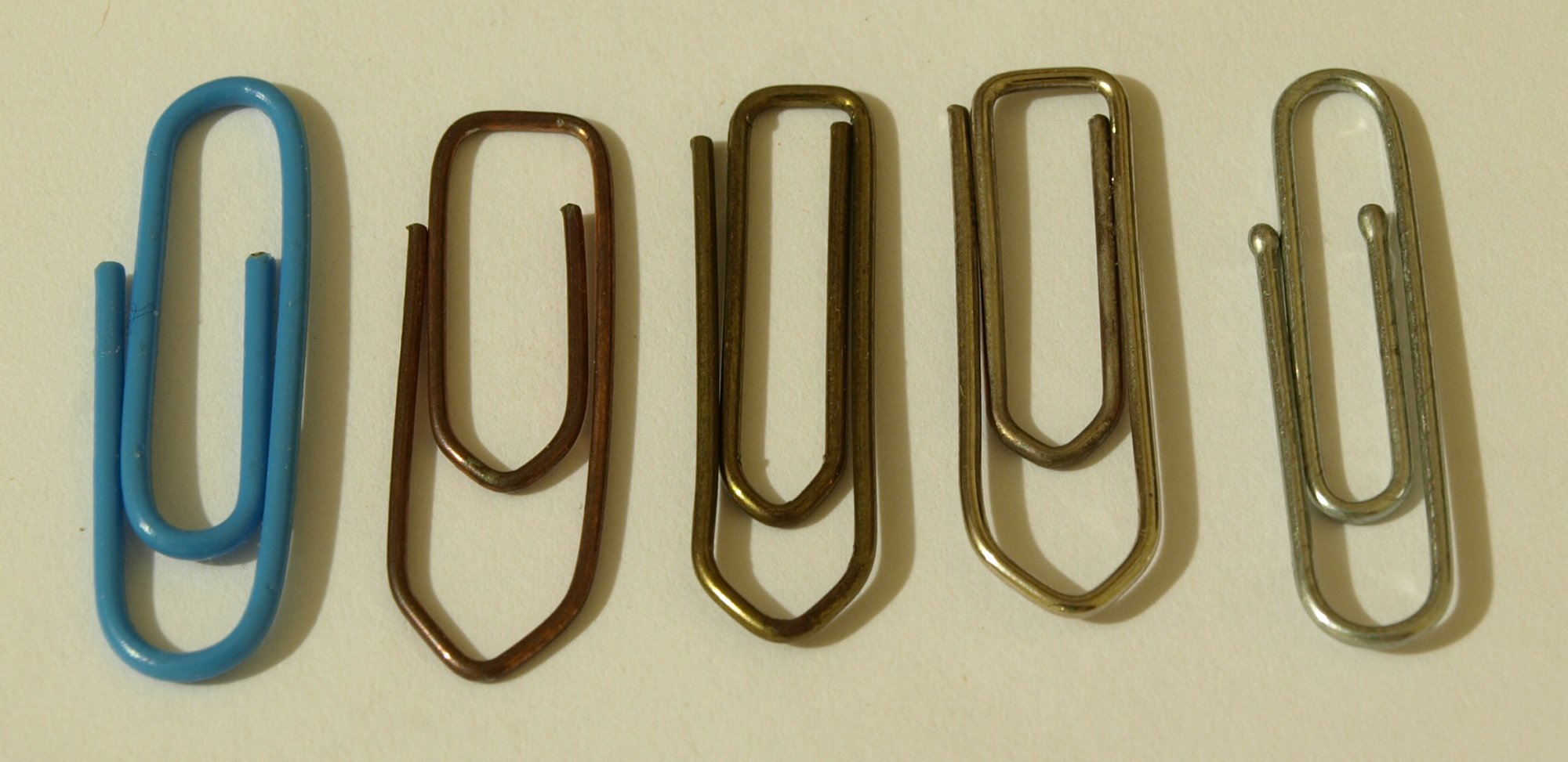 Diverse Büroklammern: kunststoffummantelt, verkupfert, vermessingt, verzinkt, mit abgerundeten Drahtenden